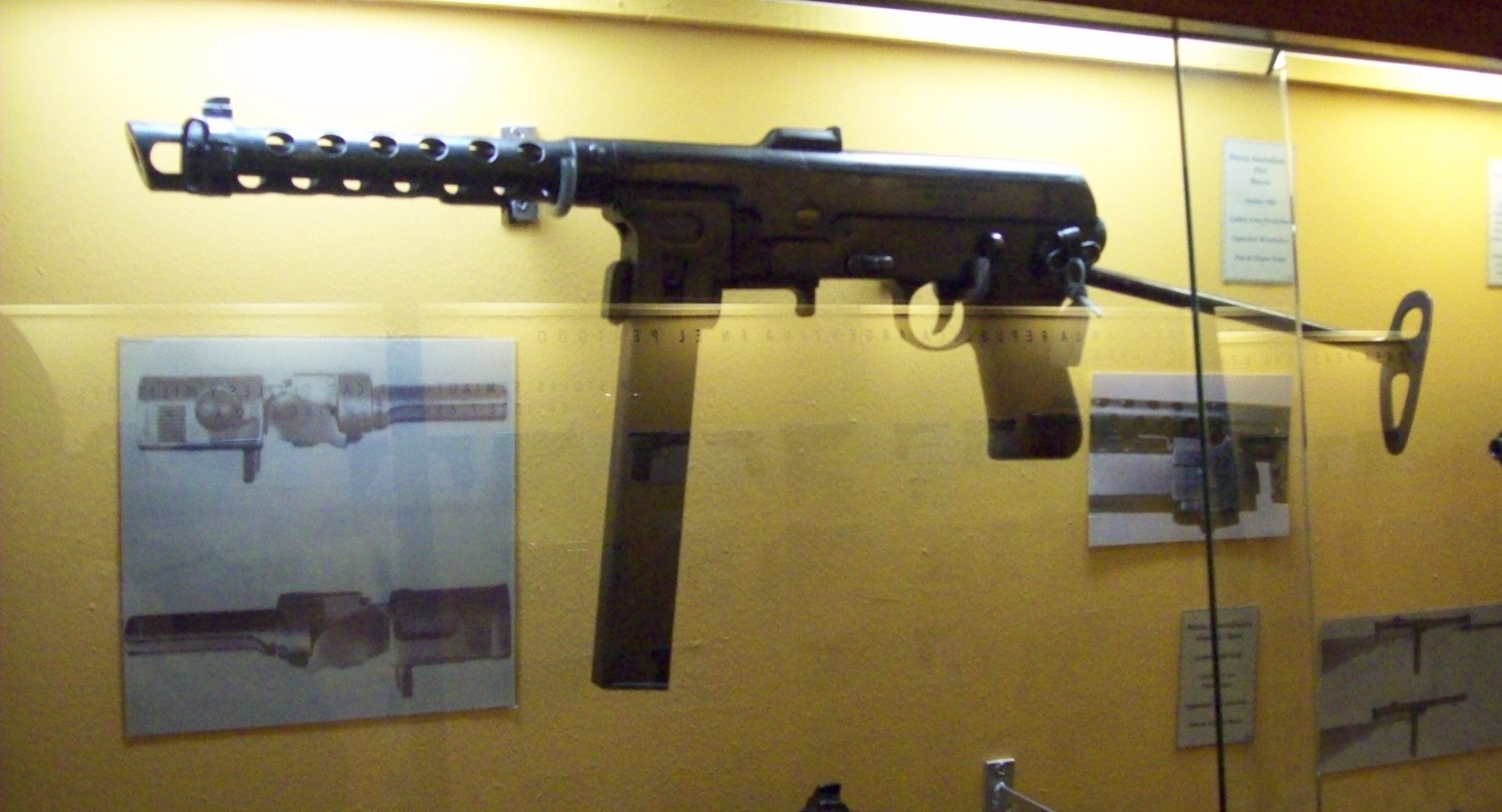 Cuchillos, picas, armaduras y bayonetas expuestas en el Museo de Armas de la Nación, ciudad de Buenos Airs, Argentina, 2014.